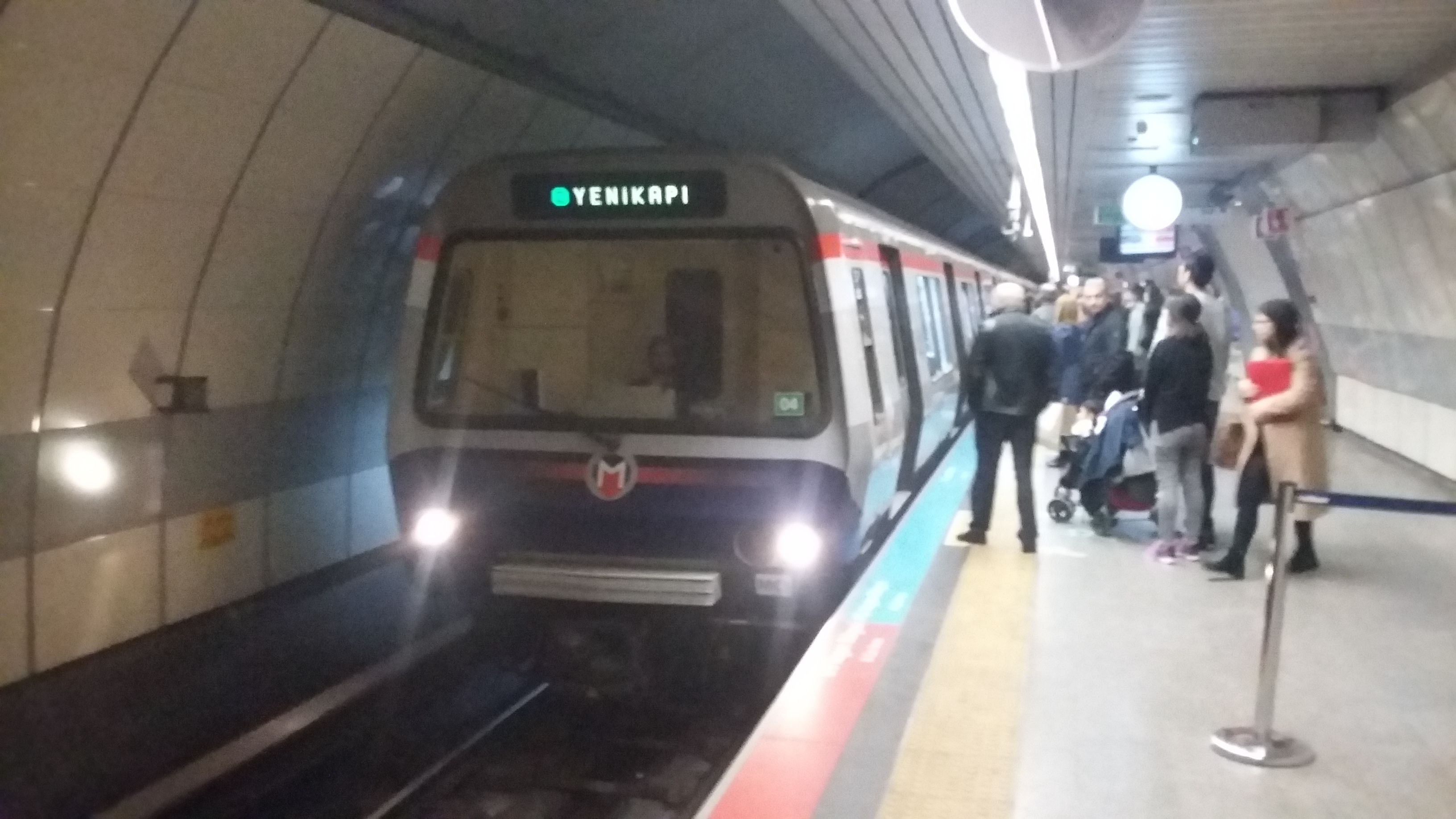 Şişli Mecidiyeköy